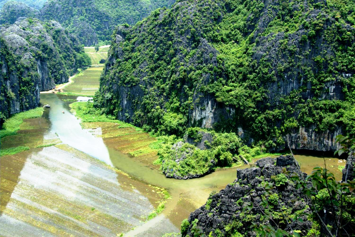 Tam Coc, Ninh Binh, Vietnam